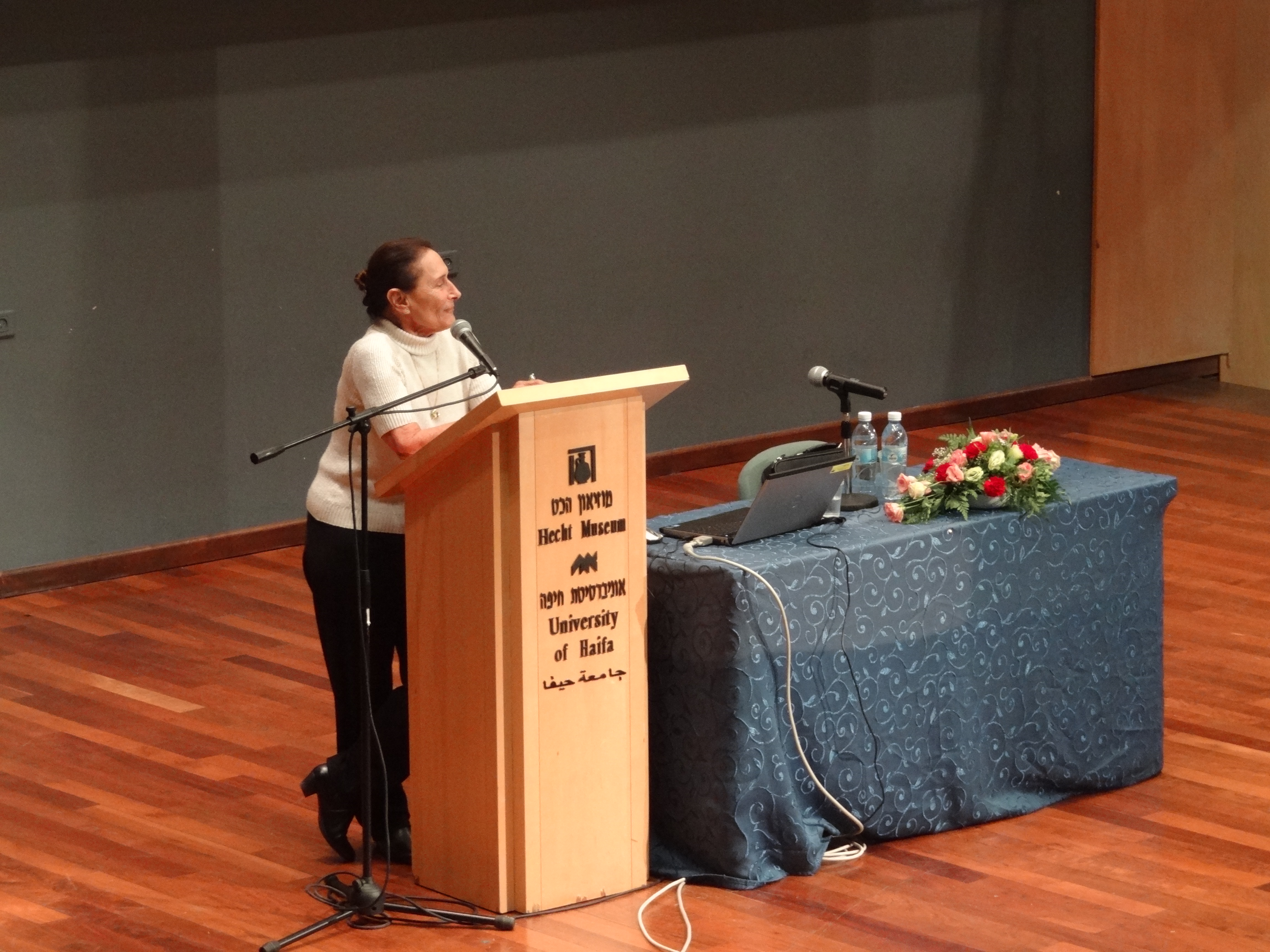 יעל דיין מרצה על ספרה החדש "מנגד" במסגרת סדרת הרצאות על נשים ופועלן שמתקיימת בתוכנית ללימודי נשים ומגדר באוניברסיטת חיפה ראו כאן עורכת הסדרה עם פרופסור ניצה בן דוב מאוניברסיטת חיפה